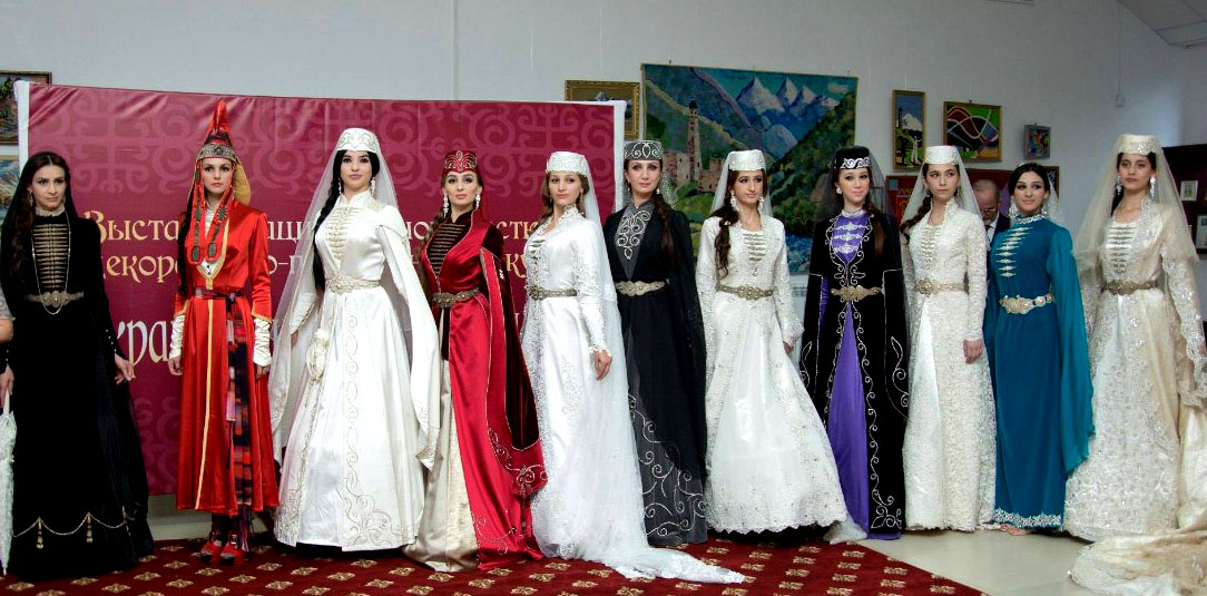 Разнотипные парадные ингушские национальные женские костюмы. Выставки «Сохраняем народные традиции».